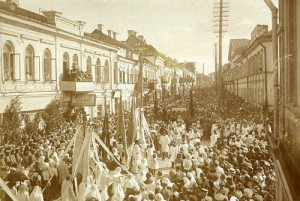 Злева будынкі перад кінатэатрам "Гродна". Савецкая вуліца.